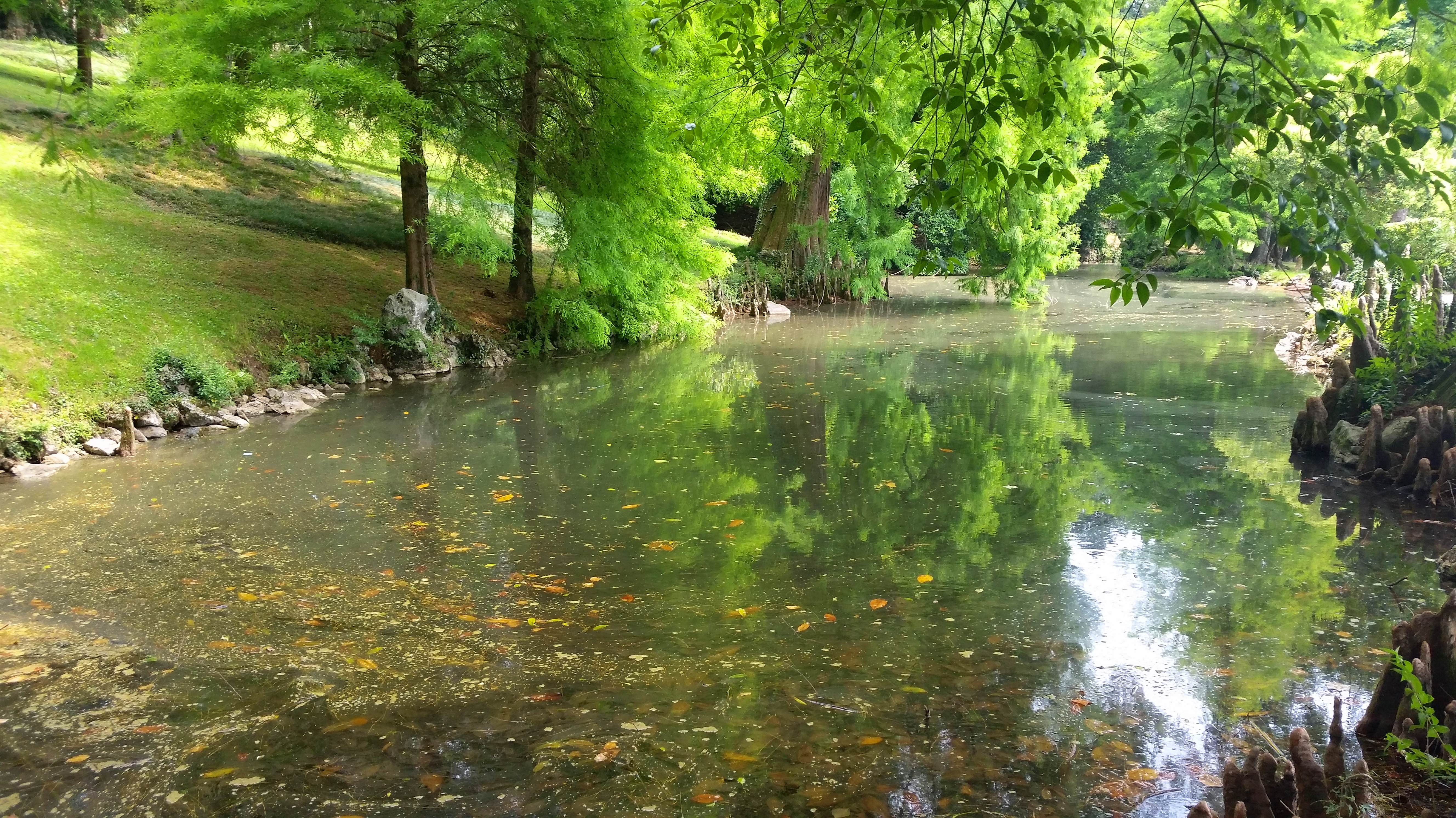 Santorso, Parco Storico di Villa Rossi